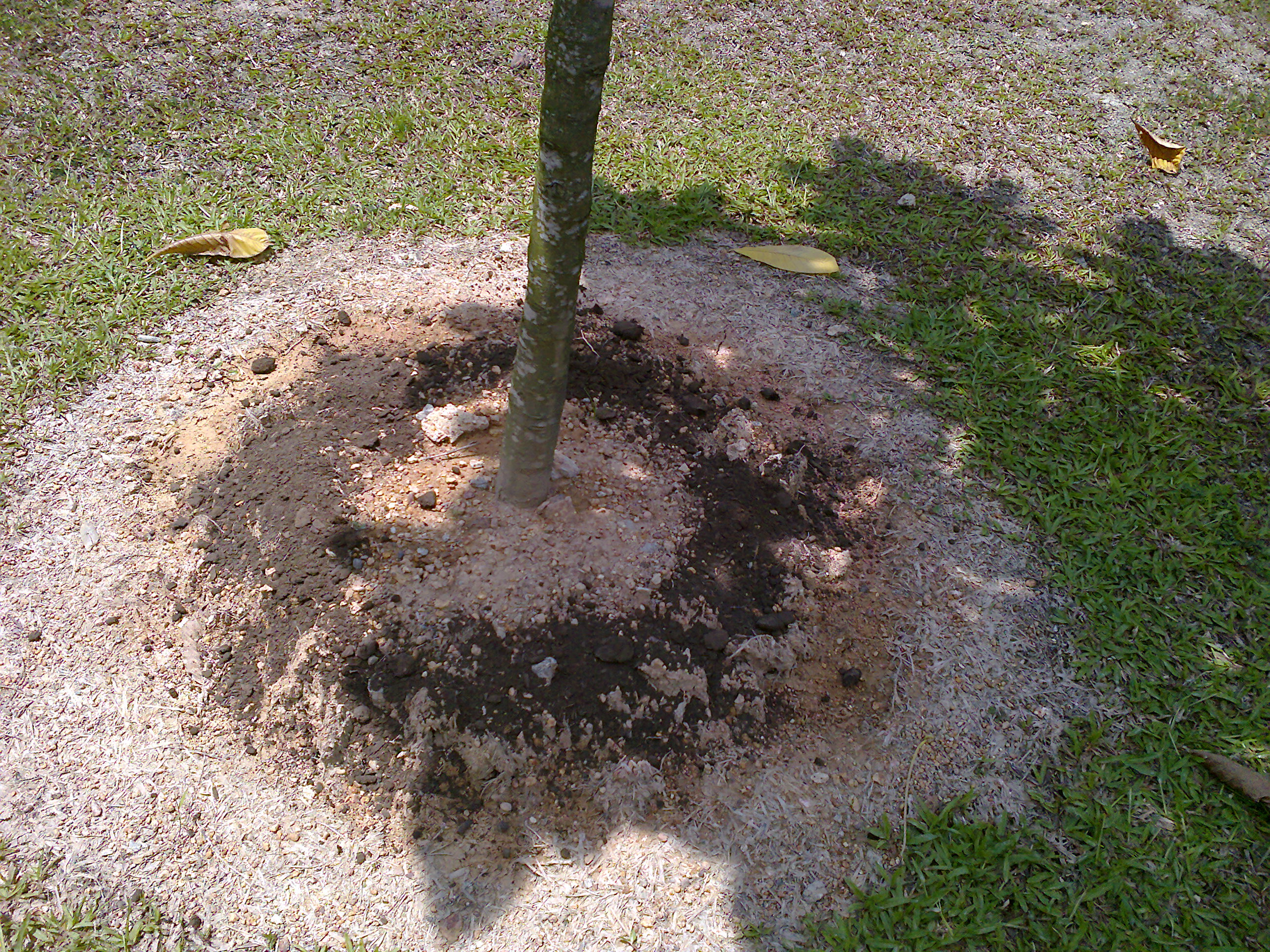 Baja tahi ayam yang telah diproses di letakkan berdekatan pangkal pokok. Tidak boleh diletakkan terlalu dekat dengan pangkal pokok dikhuatiri ia akan mencederakan batang pokok. Baja tahi ayam bersifat panas.